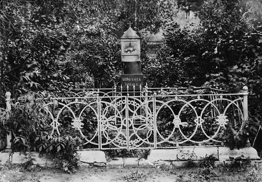 Monument to Elisaveta Alekseevna in Belyov